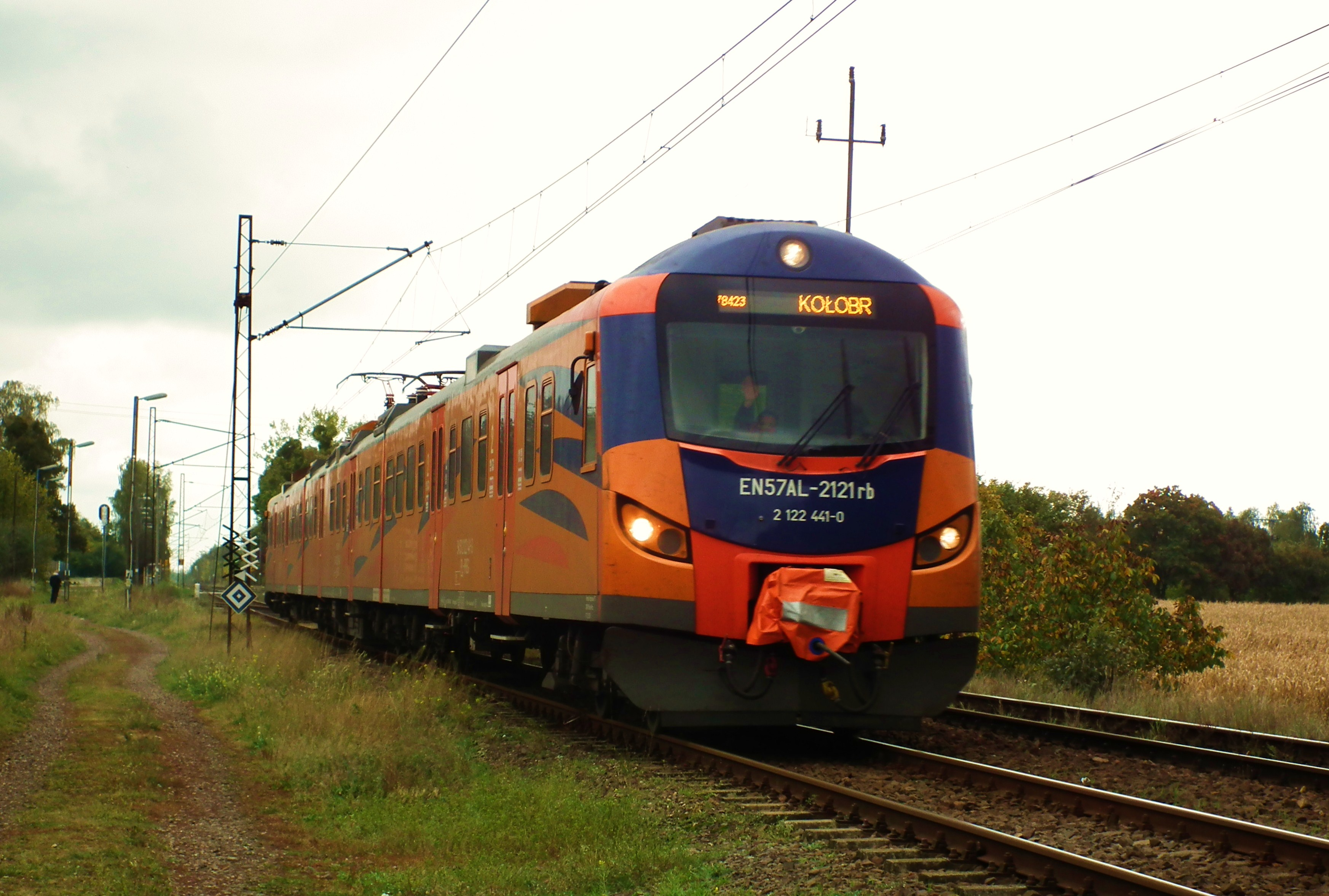 Poznań Strzeszyn - EN57AL-2121.